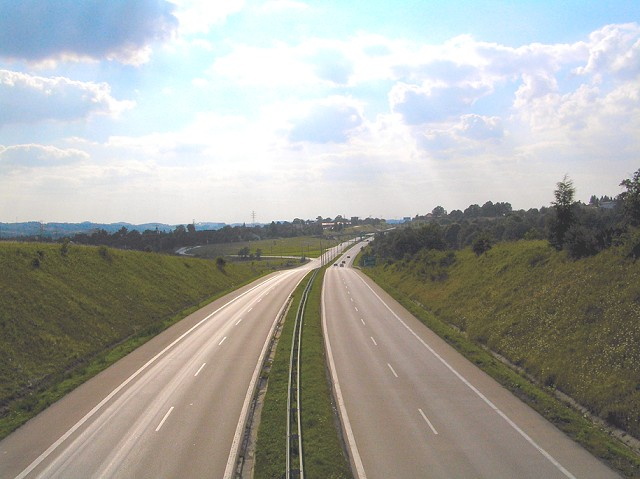 Droga ekspresowa S52 w okolicach Cieszyna, widok w kierunku przejścia granicznego z Republiką Czeską w Boguszowicach.